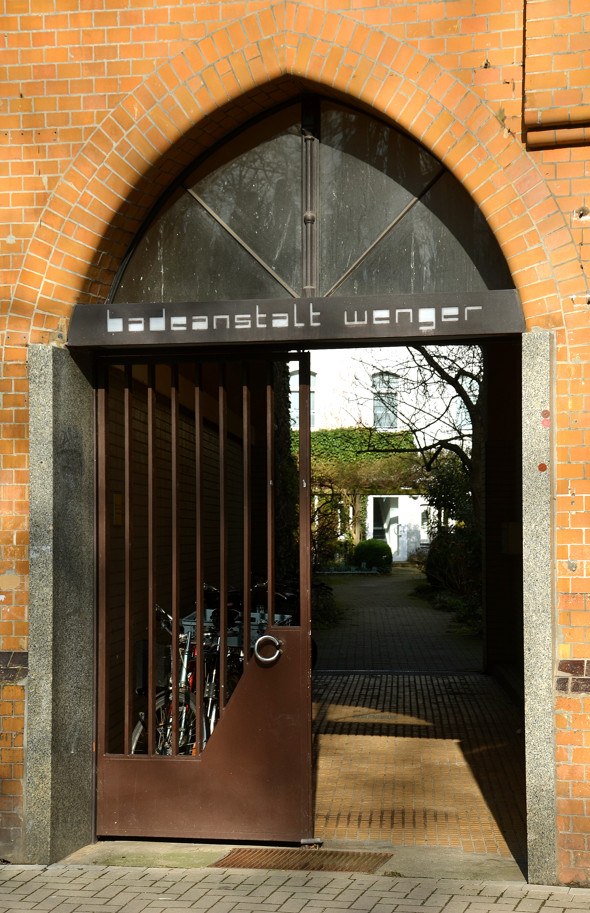 Im sogenannten "denkmalpflegerischen Interessenbereich" des Stadtteils Nordstadt von Hannover findet sich in der Oberstraße 13 nahe der Christuskirche und gegenüber dem Jüdischen Friedhof der Durchgang zur Badeanstalt Wenger, hier als erhaltener Schriftzug vermutlich der 1960er Jahre. Die eigentliche Nordstädter Badeanstalt fand sich hingegen in den niedrigen Gebäude auf dem Hinterhof des Geländes.